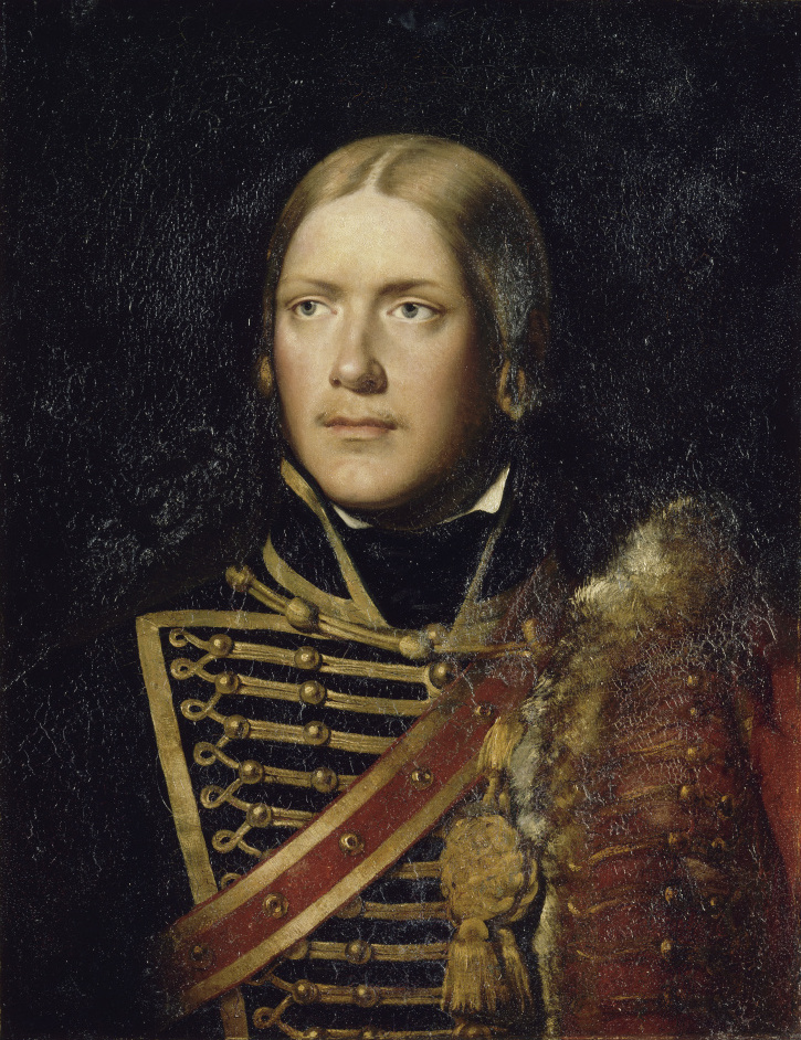 Michel Ney (1769-1815), prince de la Moskova, en uniforme de sous-lieutenant du 4e régiment de Hussards en 1792